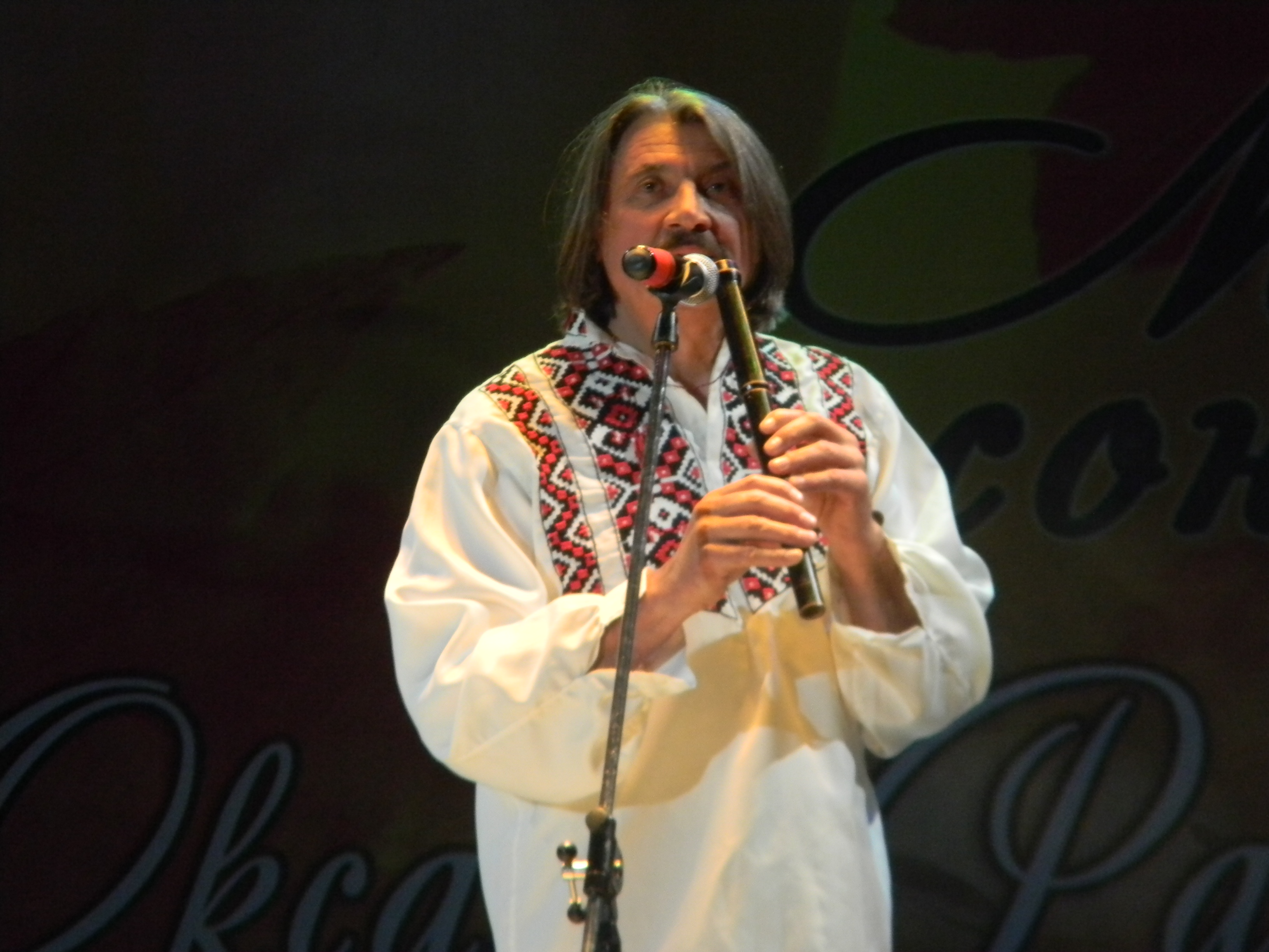 Іван Пустовий на концерті Оксани Радушинської